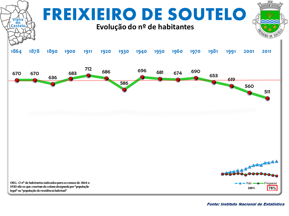 Censos 1864/2011